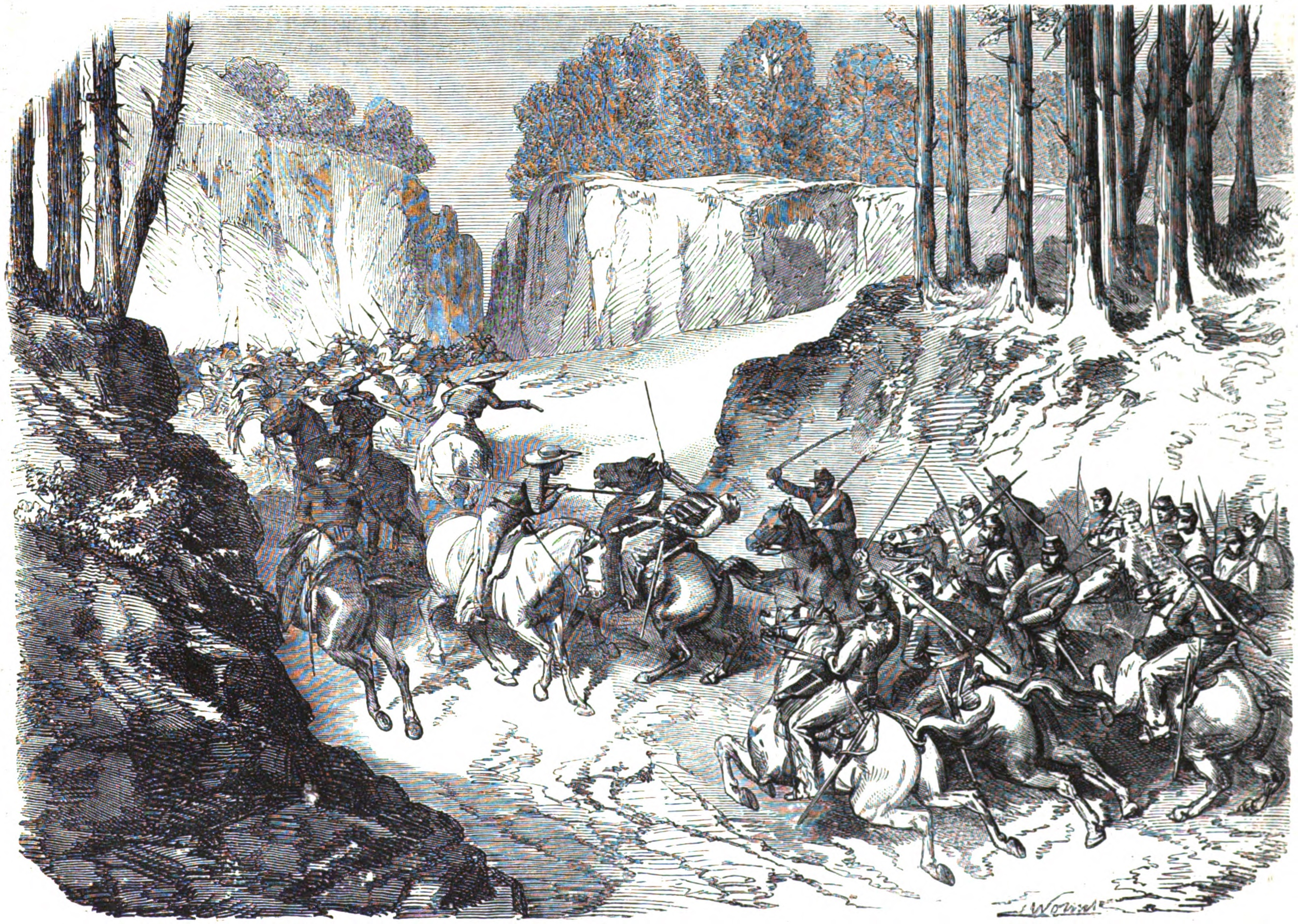 COMBAT DE SAN-PABLO DEL MONTE. Mort du commandant Aymard de Foucault. — D'après un croquis de M. Cabot.